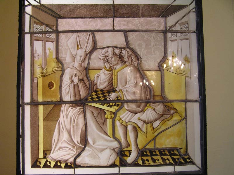 Vitrail les joueur d'échec hôtel de Cluny Paris musée national du Moyen age